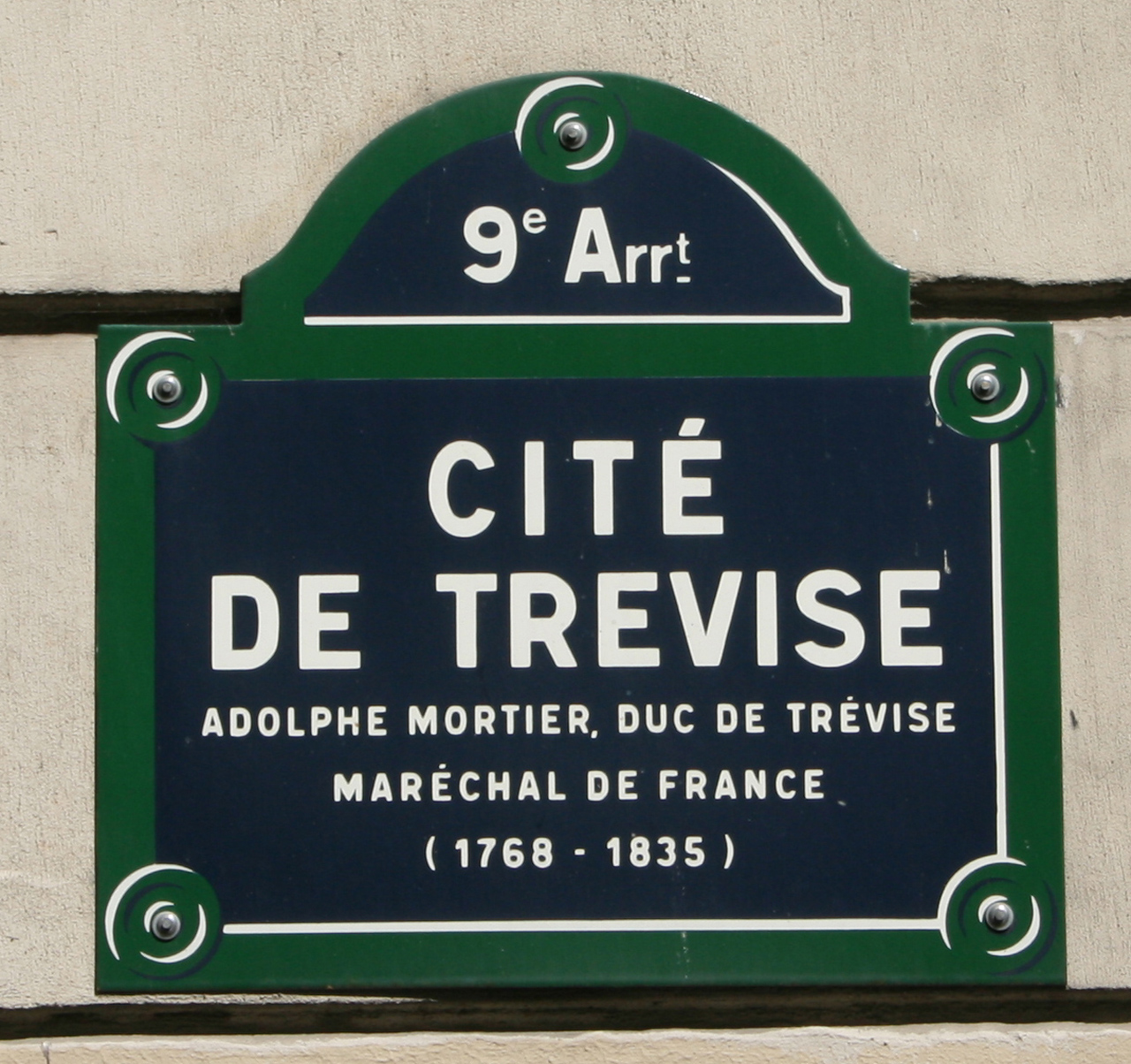 Plaque de la Cité de Trévise, Paris 9e